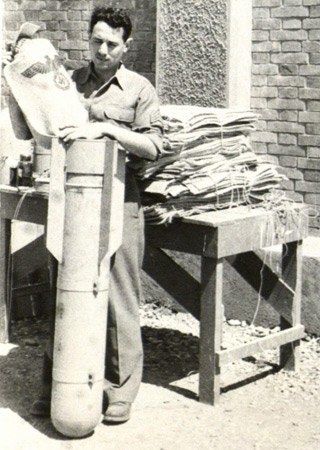 Ein OSS-Angehöriger belädt eine "Bombe" mit gefälschten Postsäcken im Rahmen der Operation "Cornflakes"